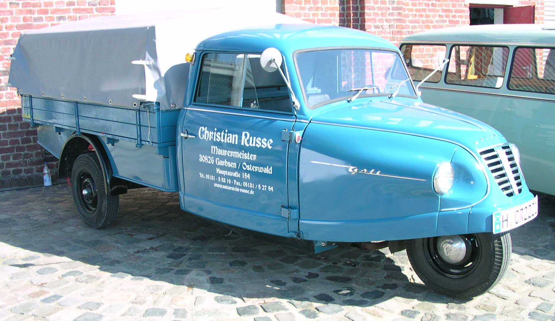 Willich, Borgward-Treffen im LKW-Museum, Borgward-LKW, Goli-Dreirad (Goliath) mit Pritsche und niedriger Plane